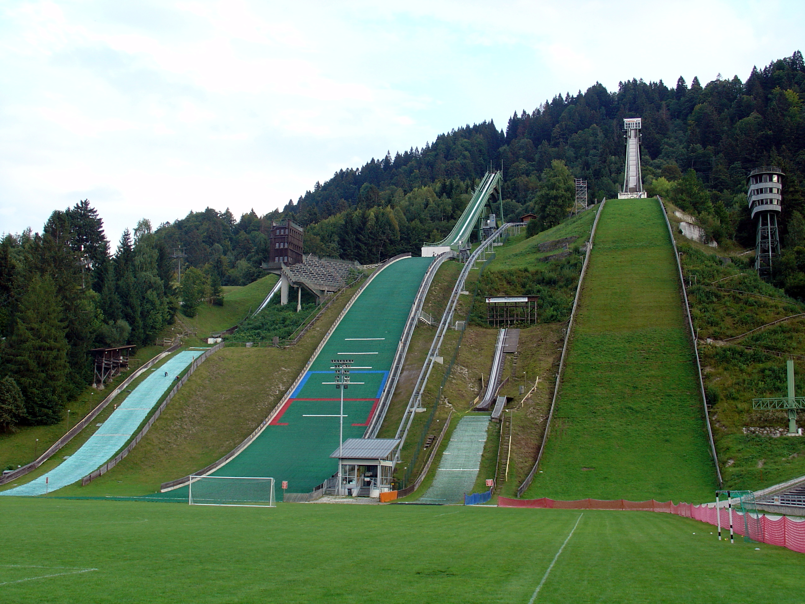 Olympiaschanze in Garmisch-Partenkirchen, Germany. Original description: 2004-09-19 Partenkirchen, Wamberg, Eckbauer Alm, Partnachklamm 057